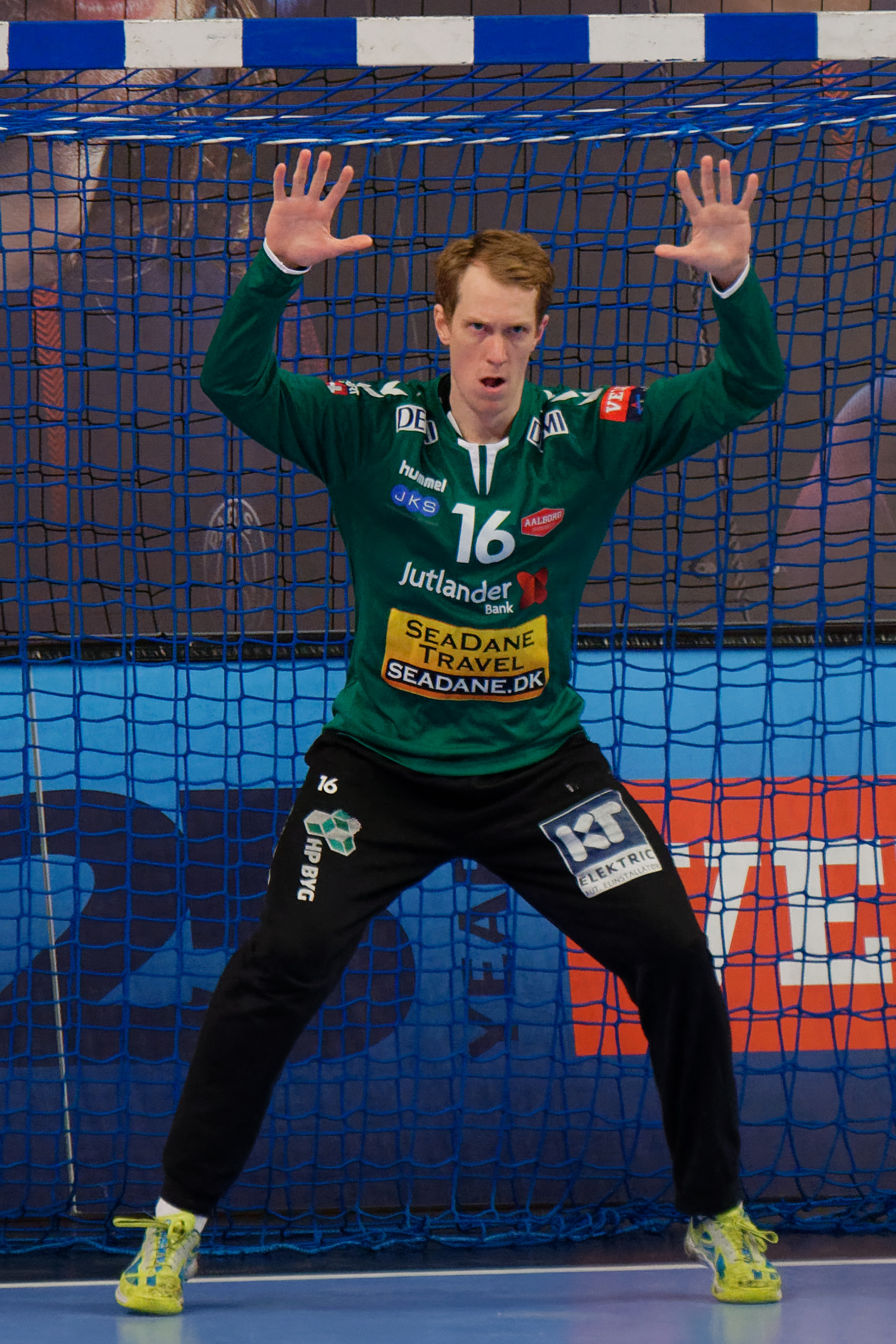 Rencontre de phase de groupe de la ligue des champions 2017/18 entre le PSG et Aalborg. A Coubertin, le 2 décembre 2017.